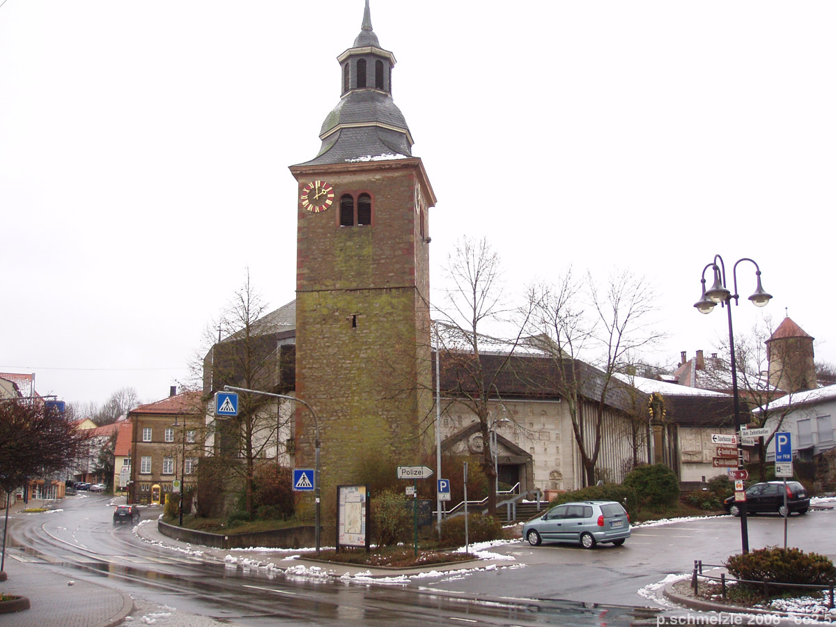 Kilianskirche in Osterburken